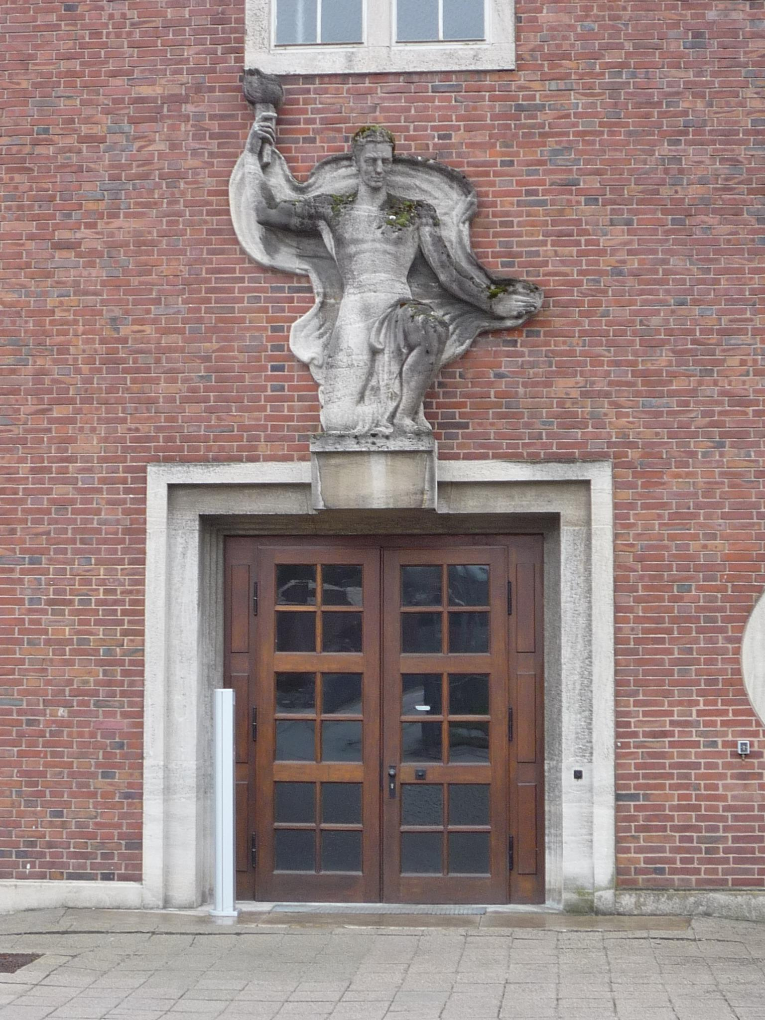 Kraftwerk Marbach, Eingang zum Block 1